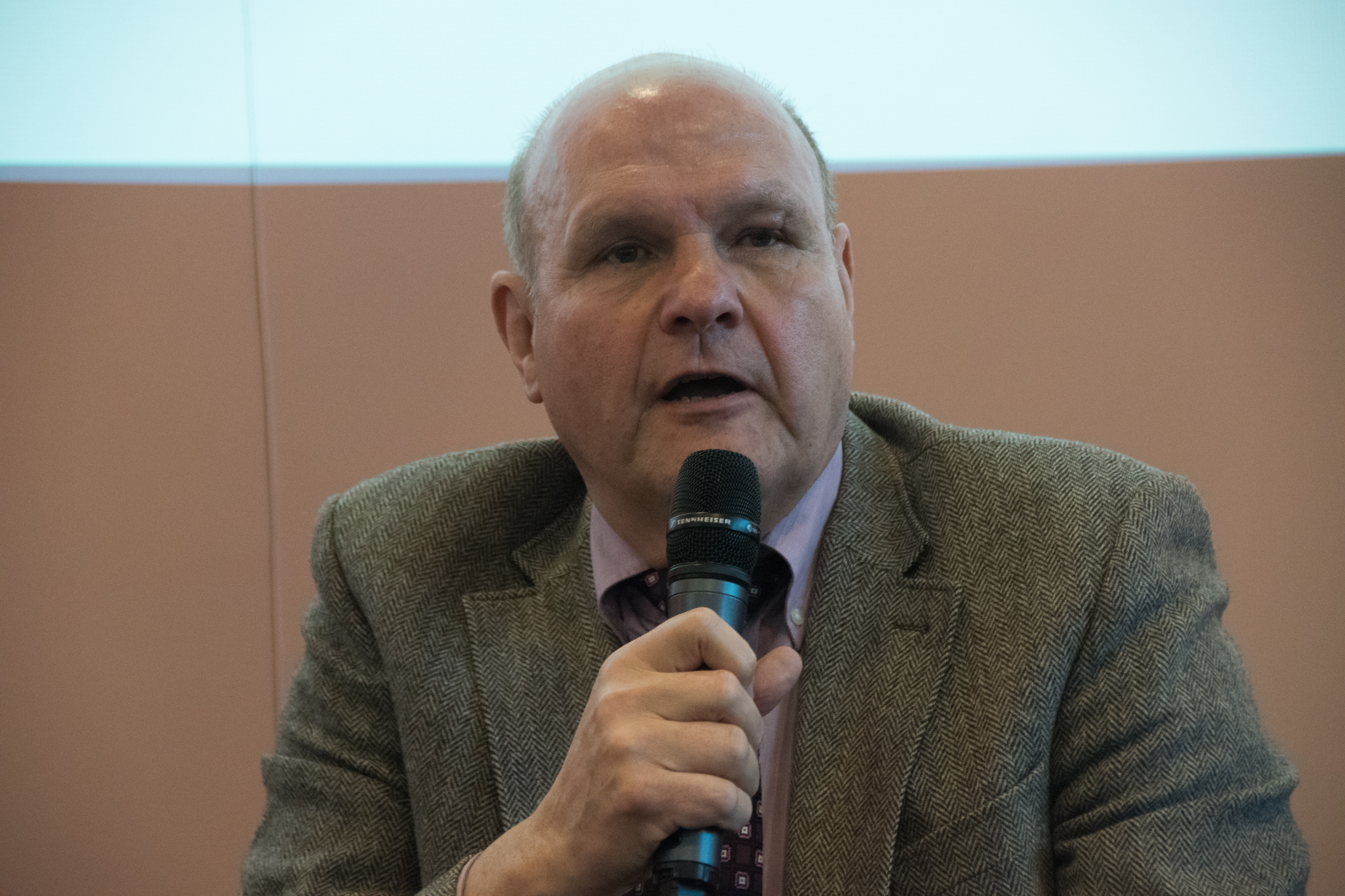 DIDACTA 2017 in Stuttgart